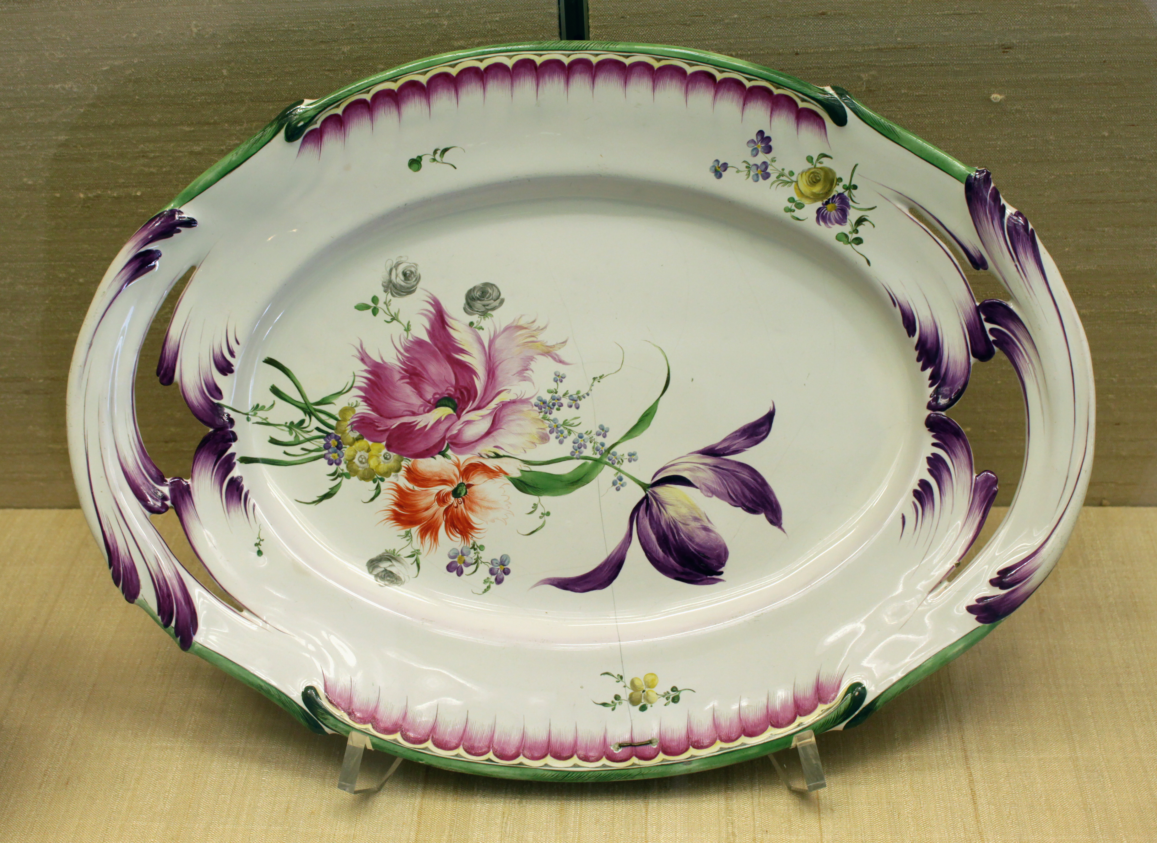 Plat à décor floral, porcelaine, manufacture de Niderviller, période Beyerlé, 1759-1770. Kunstgewerbemuseum, à Berlin.